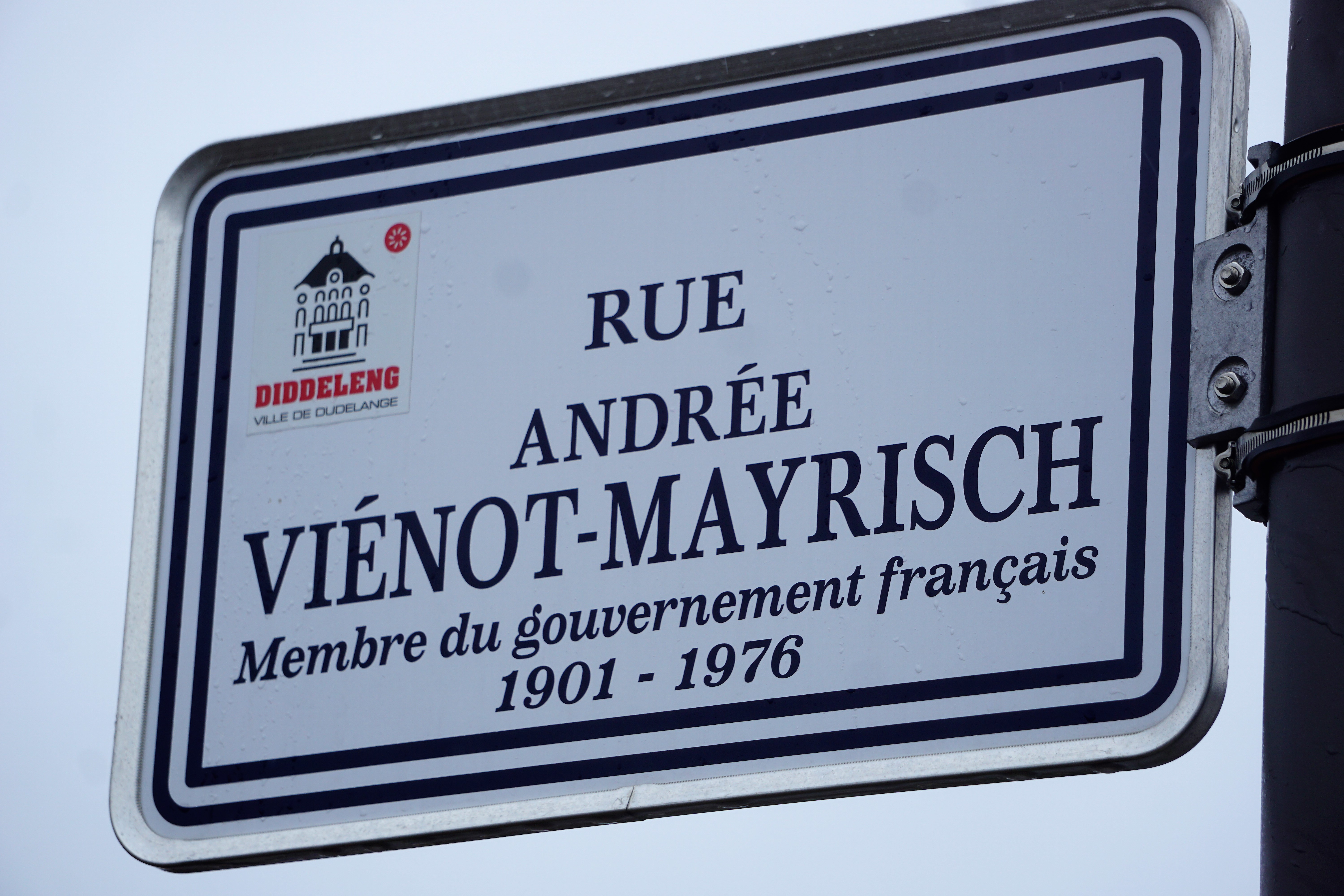 Plaque de nom de rue à Dudelange, quartier Lenkeschléi.